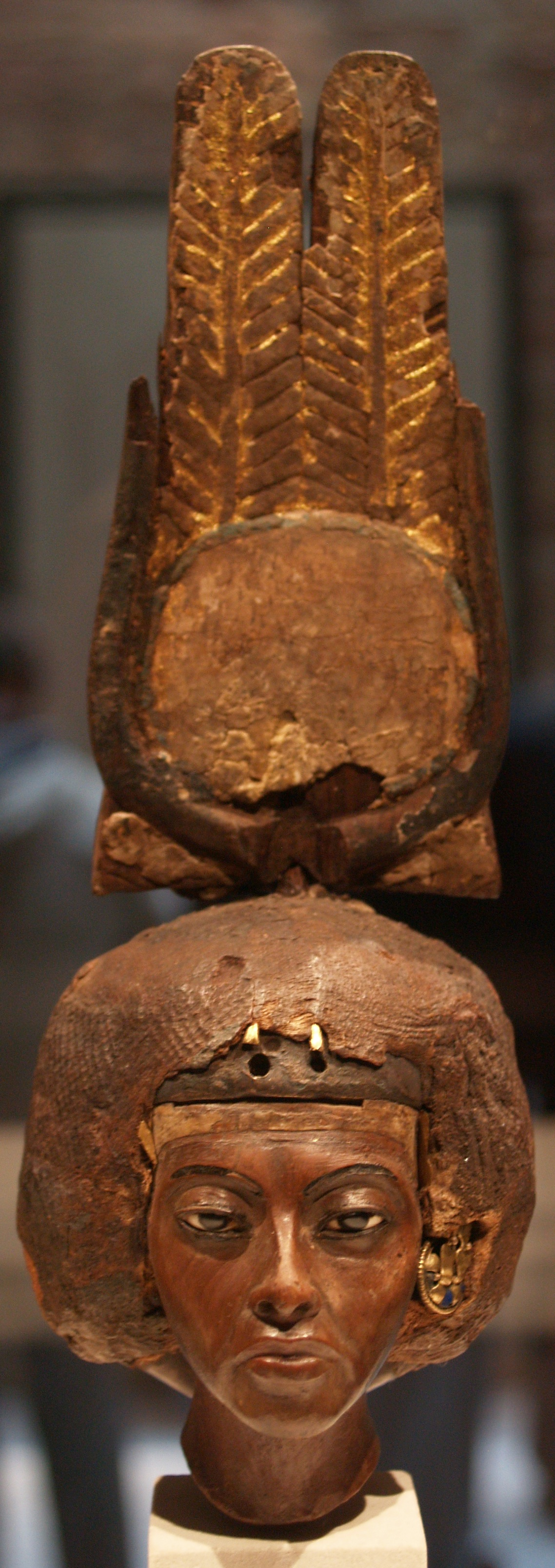 Berlín. Neues Museum. Cabeza de la reina Tiy procedente del Sinaí.